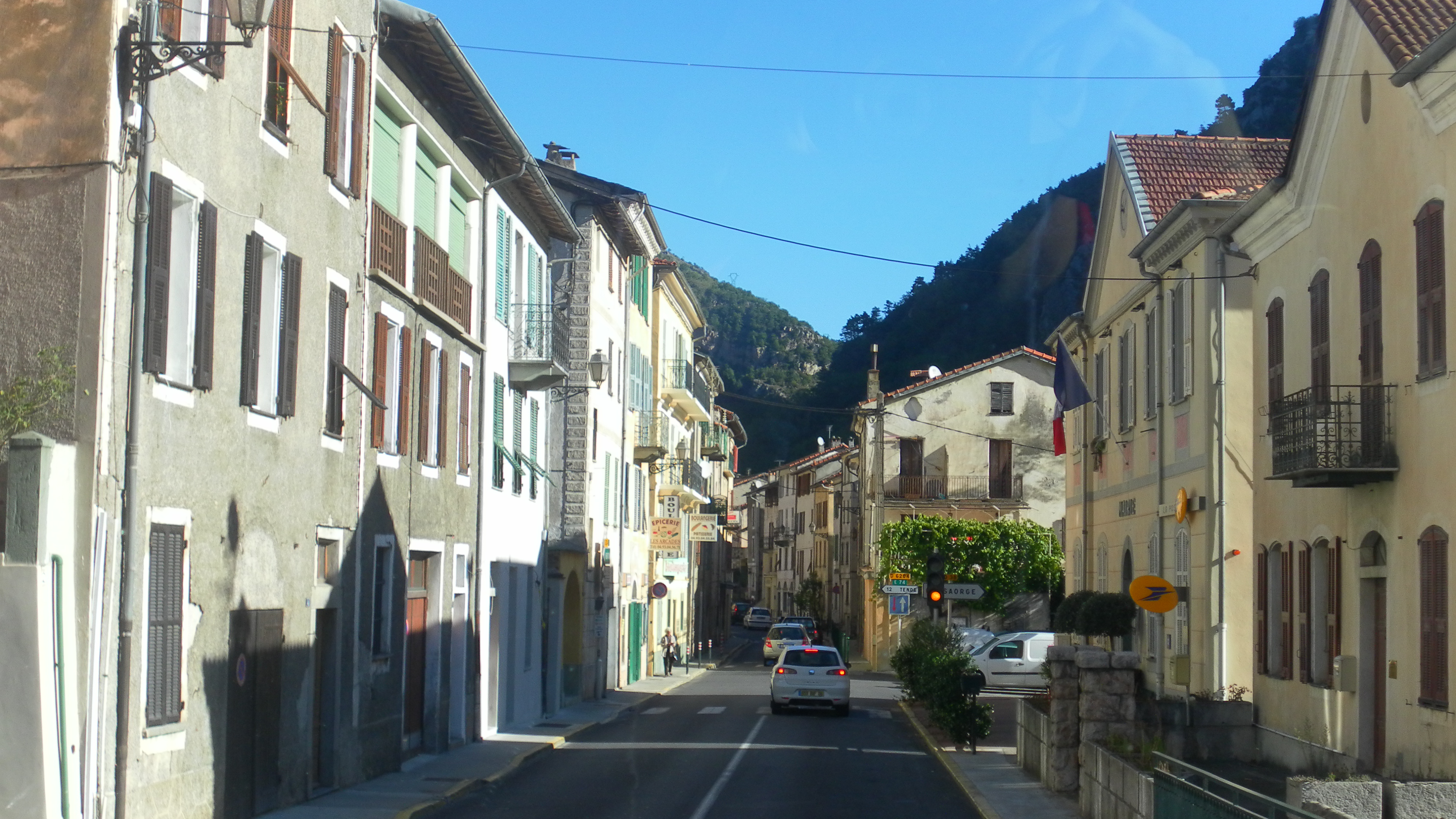 Vista del paese di Fontan nella valle del Roia francese.